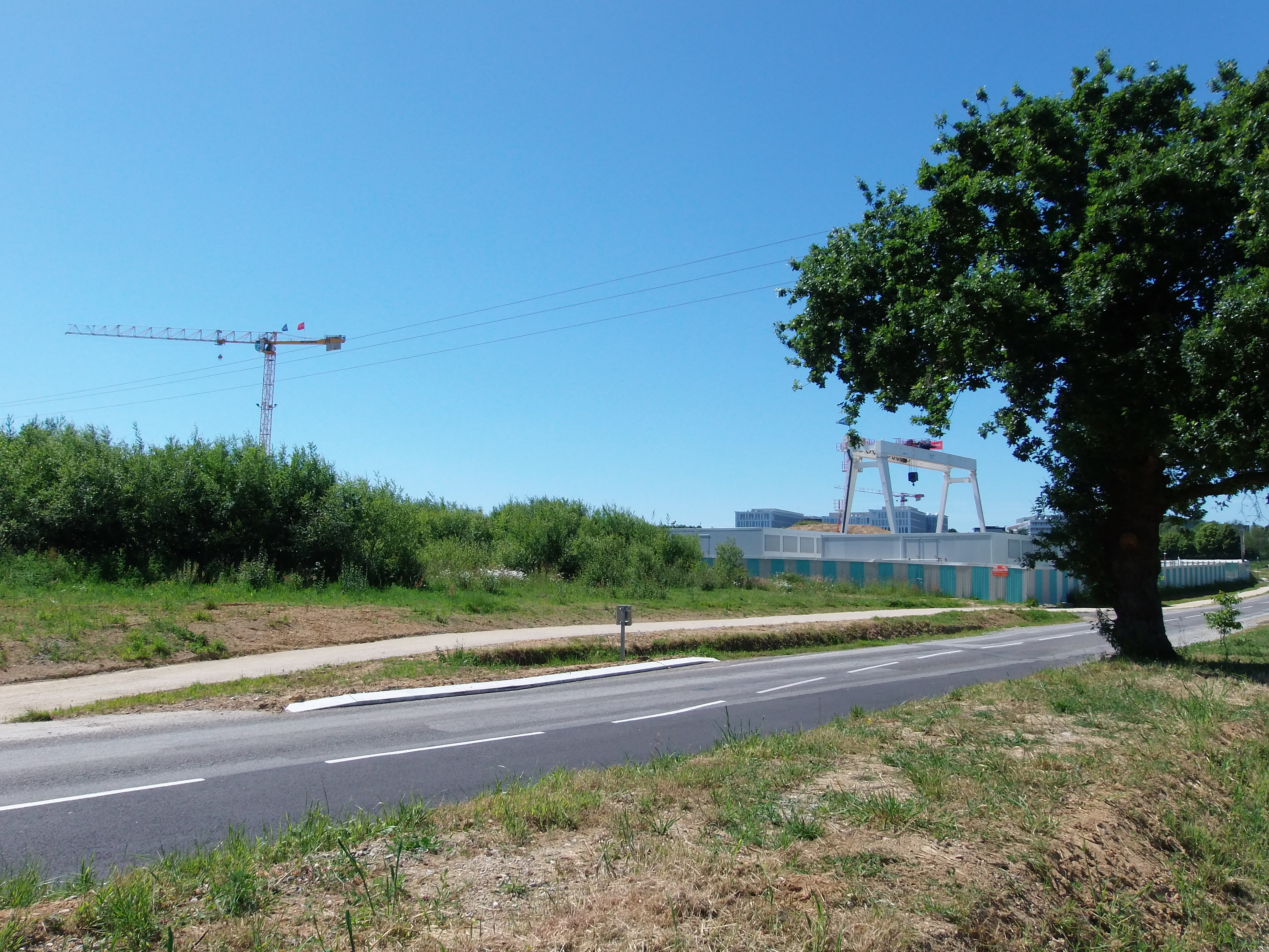 Vue sur les travaux de la station Cesson Viasilva depuis l'Avenue des Champs Blancs pour la future ligne B du métro de Rennes.